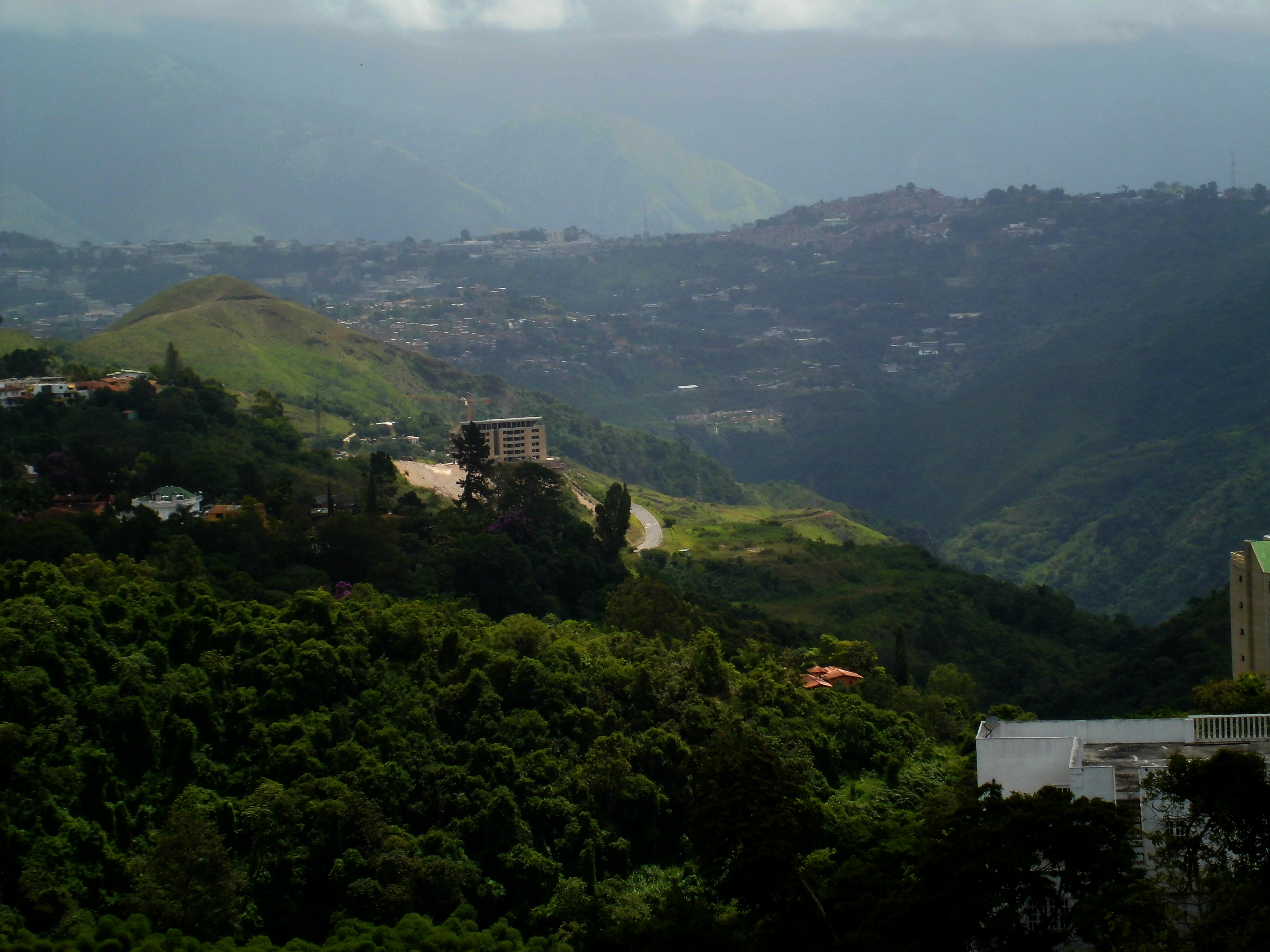 Peñon de Las Guacas y Cañón del río Guaire al este del municipio El Hatillo, estado Miranda - Venezuela